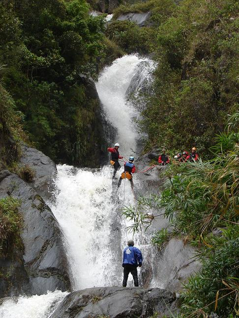 Canyoning en Baños de Agua Santa